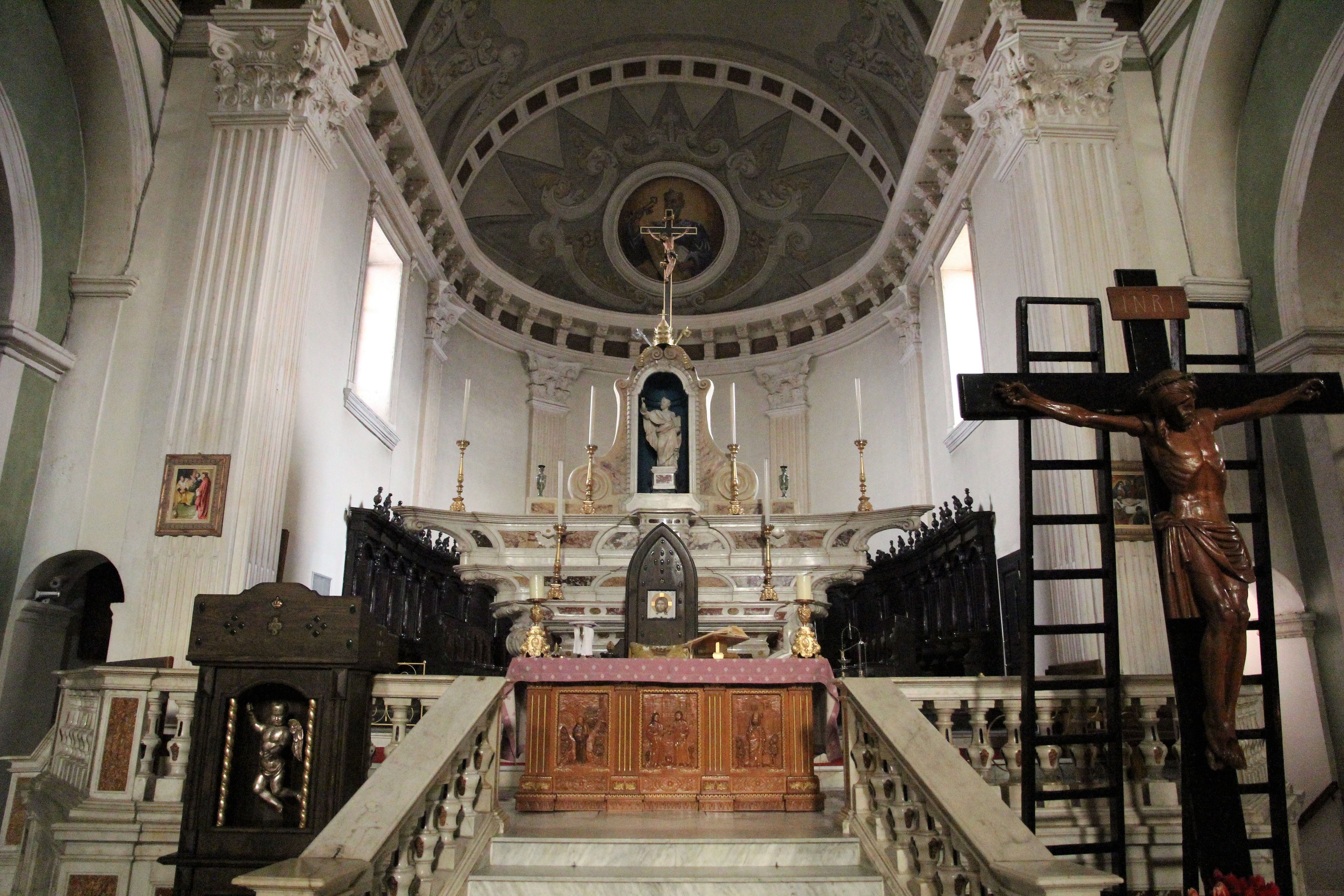 Tempio Pausania, chiesa di San Pietro